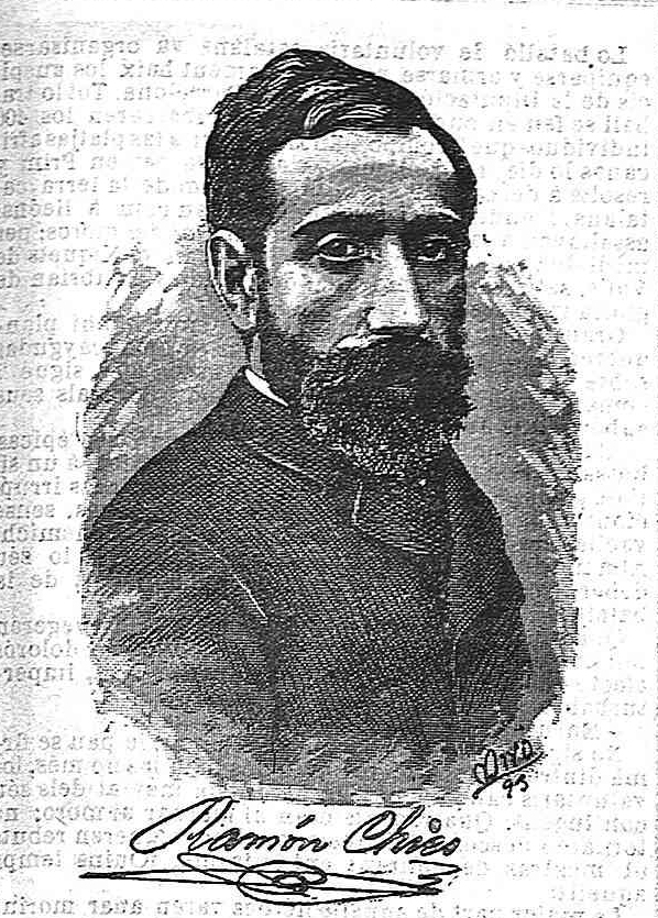 Retrato de Ramón Chíes, publicado en la revista La Campana de Gracia.